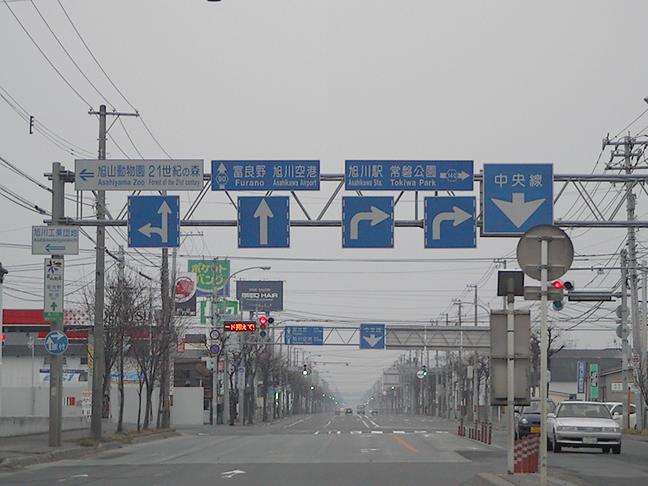 道道90号（豊岡14条6丁目）を東光方面に向けて撮影。